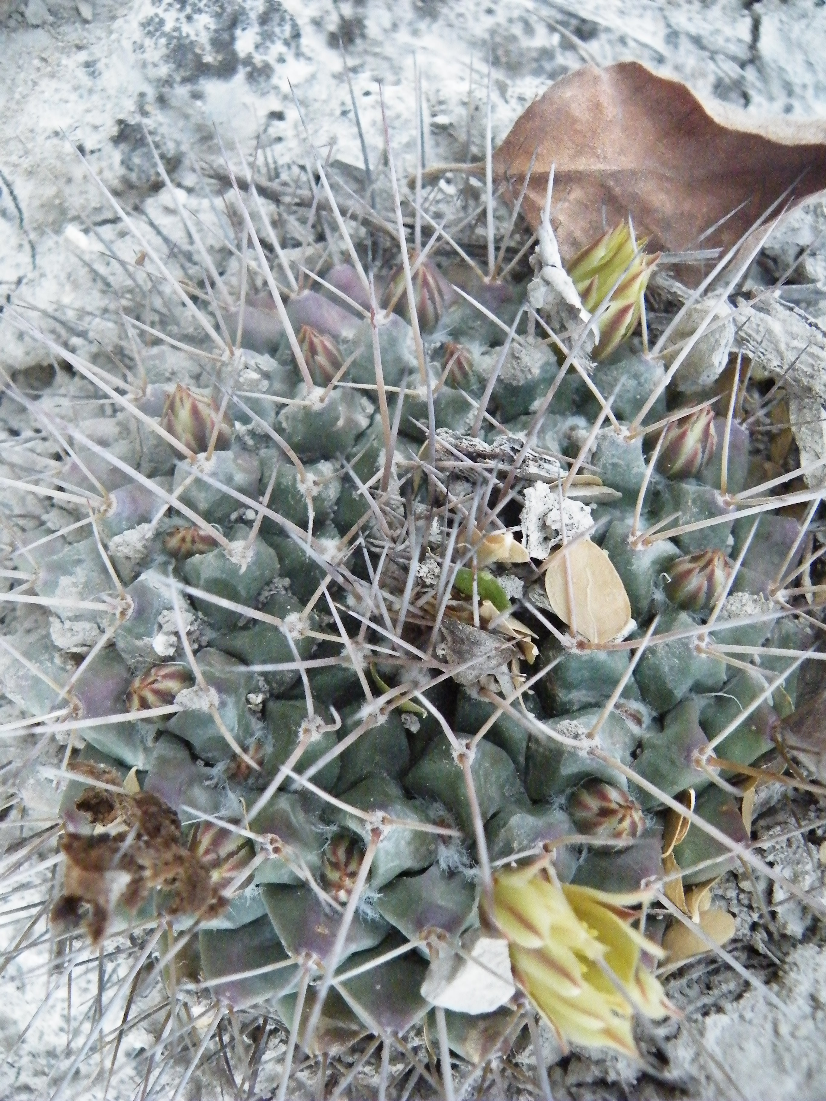 Rayones, Nuevo Leon